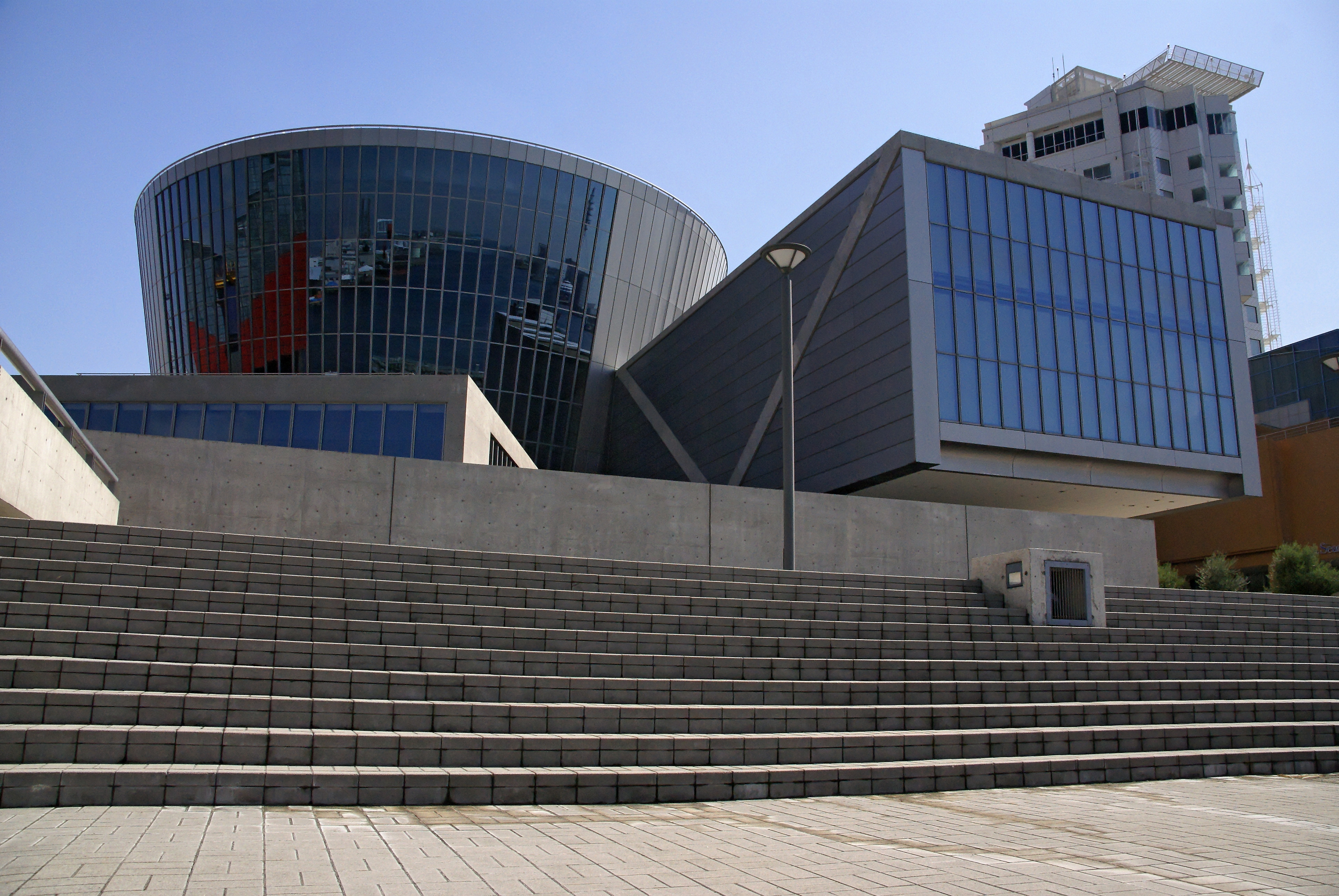 Suntory Museum in Osaka, Osaka prefecture, Japan